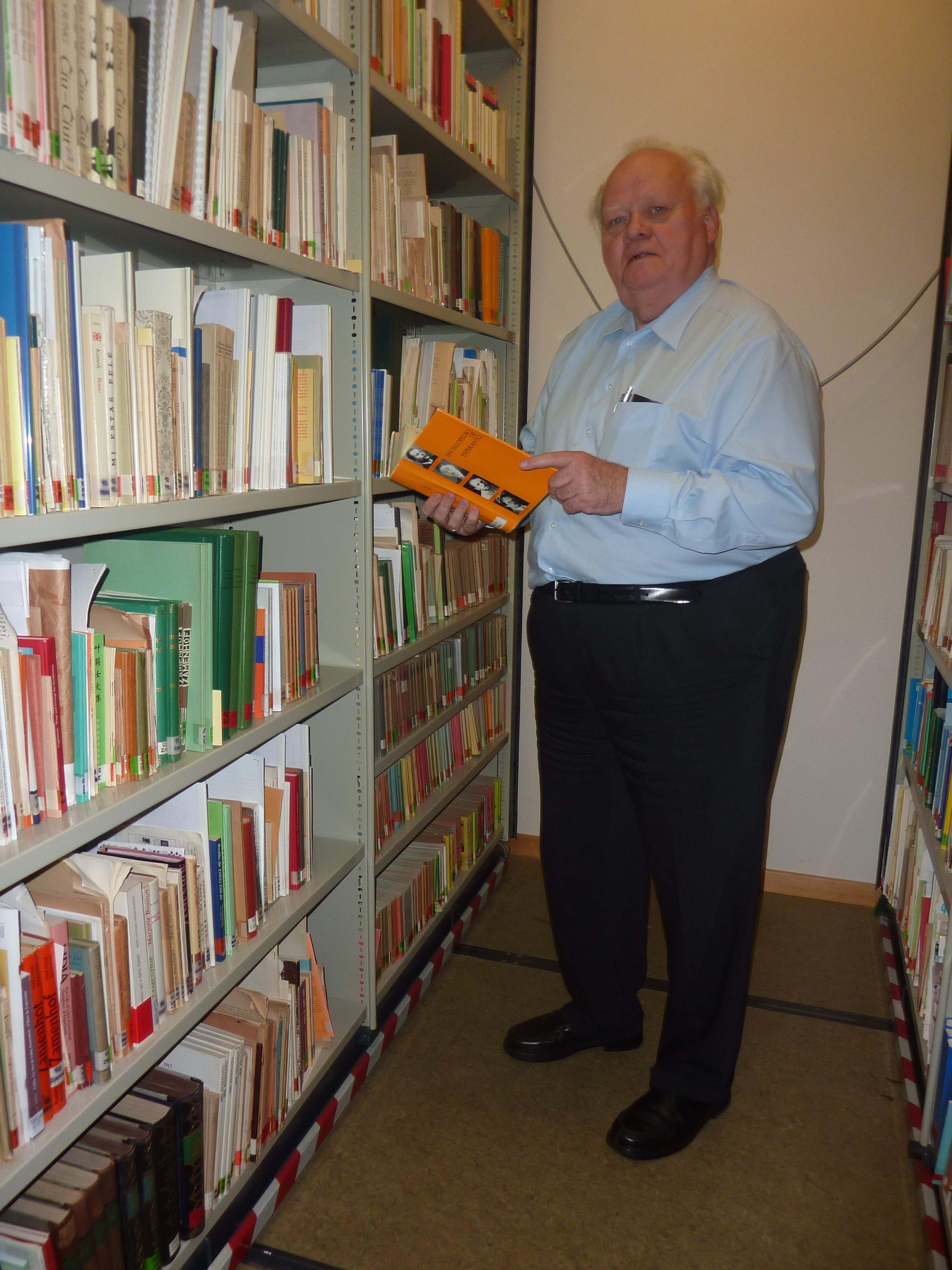 Karl Heinz Schaeffer, afergvidanto de la Germana Esperanto-Biblioteko en Aalen, foliumanta tra la Enciklopedio de Esperanto inter la bretaroj de la biblioteko.